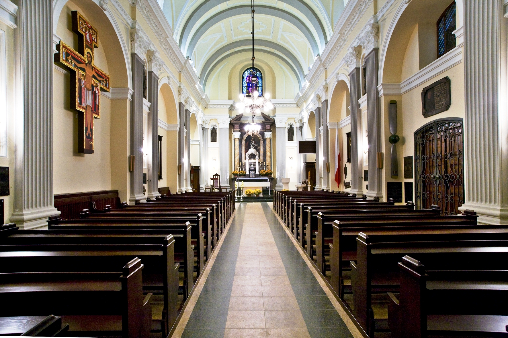 Wnętrze kościoła św. Agnieszki w Krakowie